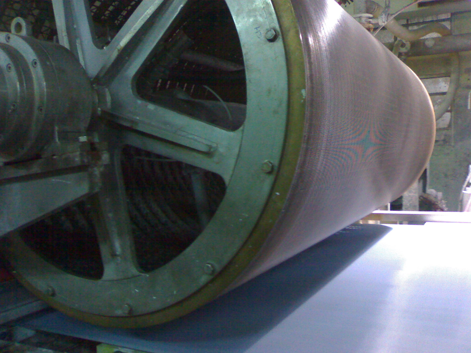 Dandy